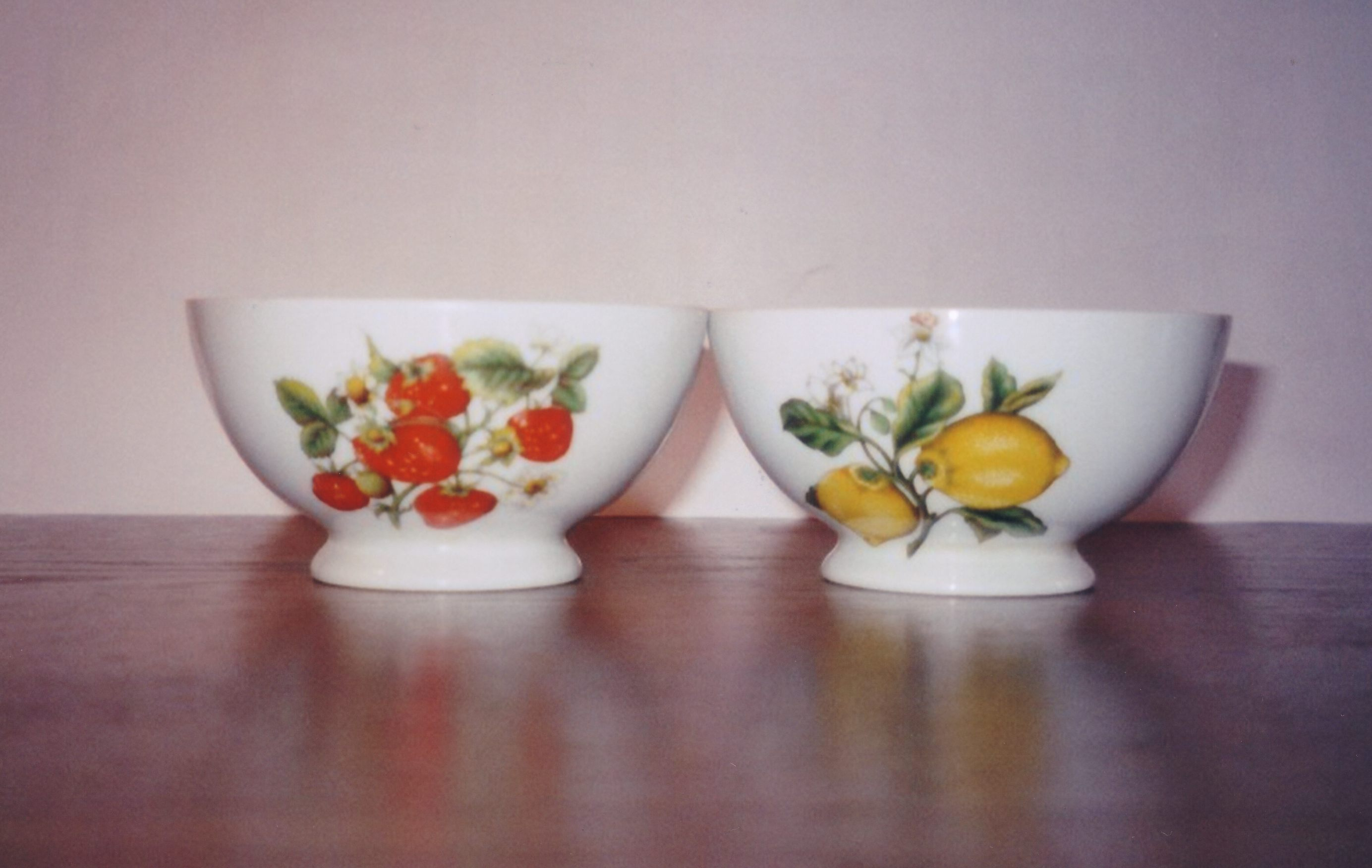 Bols en porcelaine de Limoges, produit au milieu des années 1990. Inscription sous les bols : Porcelaine du Lys Royal, Limoges authentique, Limoges France